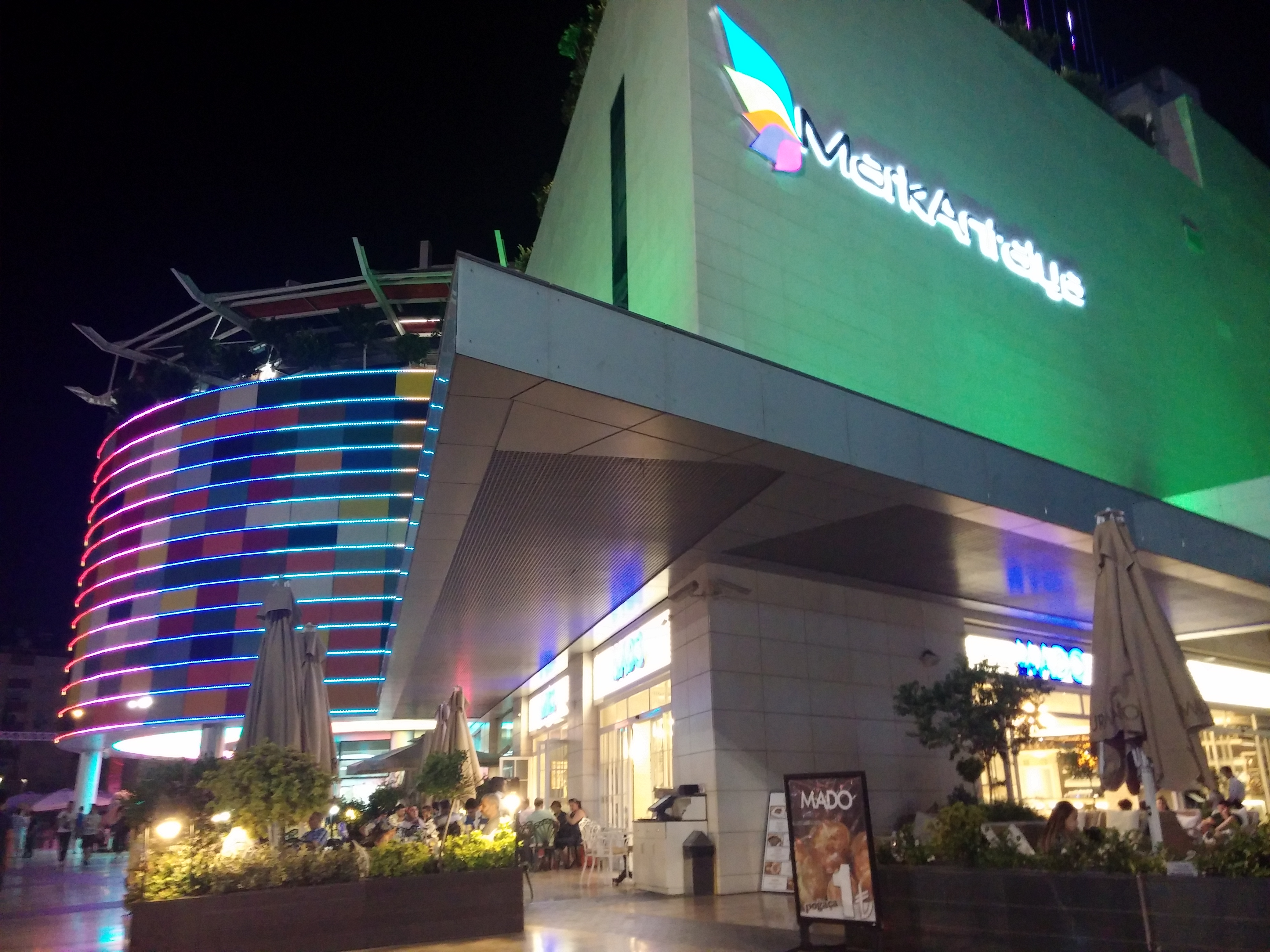 Antalya'nın Muratpaşa ilçesinde yer alan MarkAntalya alışveriş merkezi.